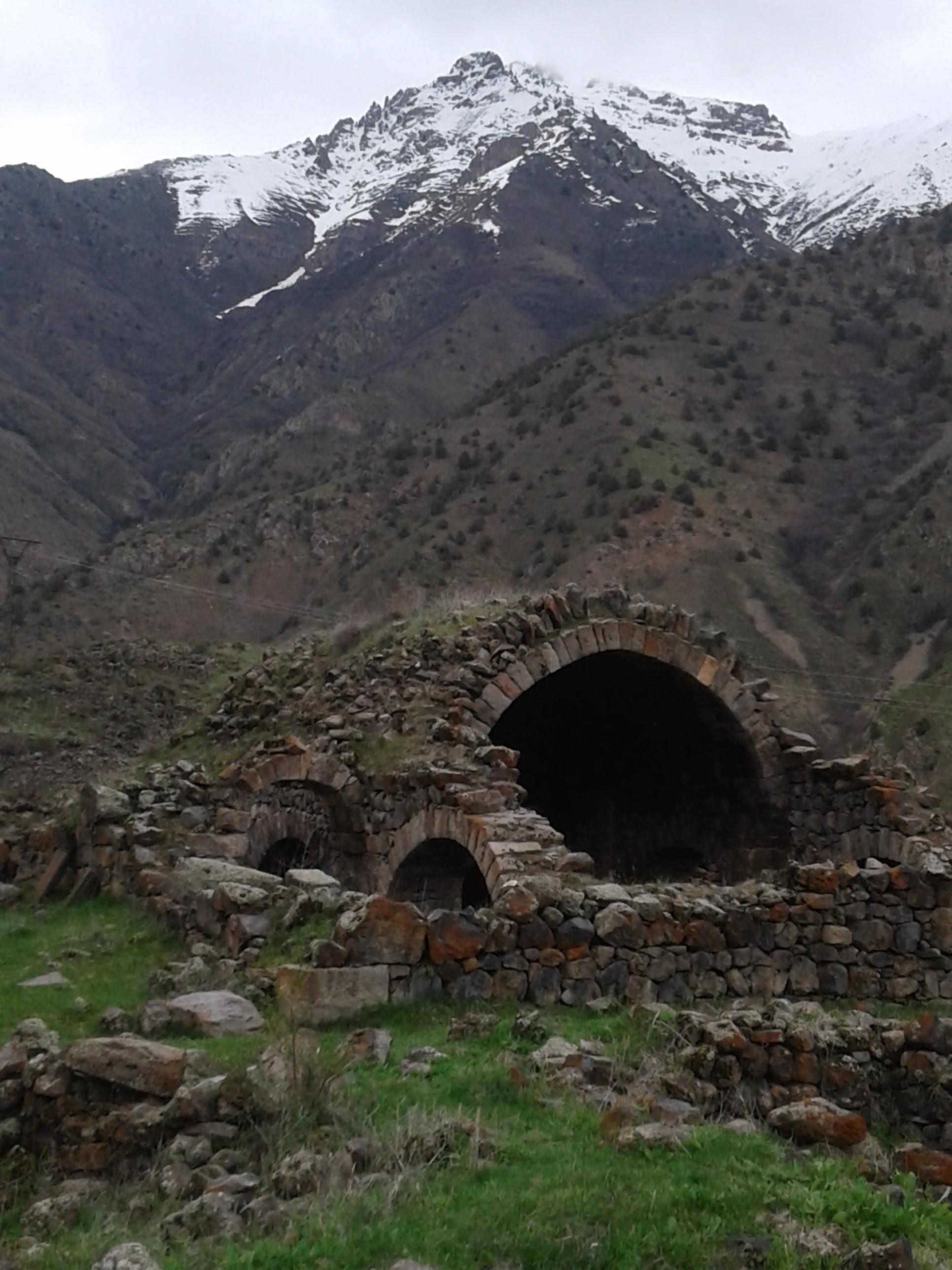 Հոստունի եկեղեցի